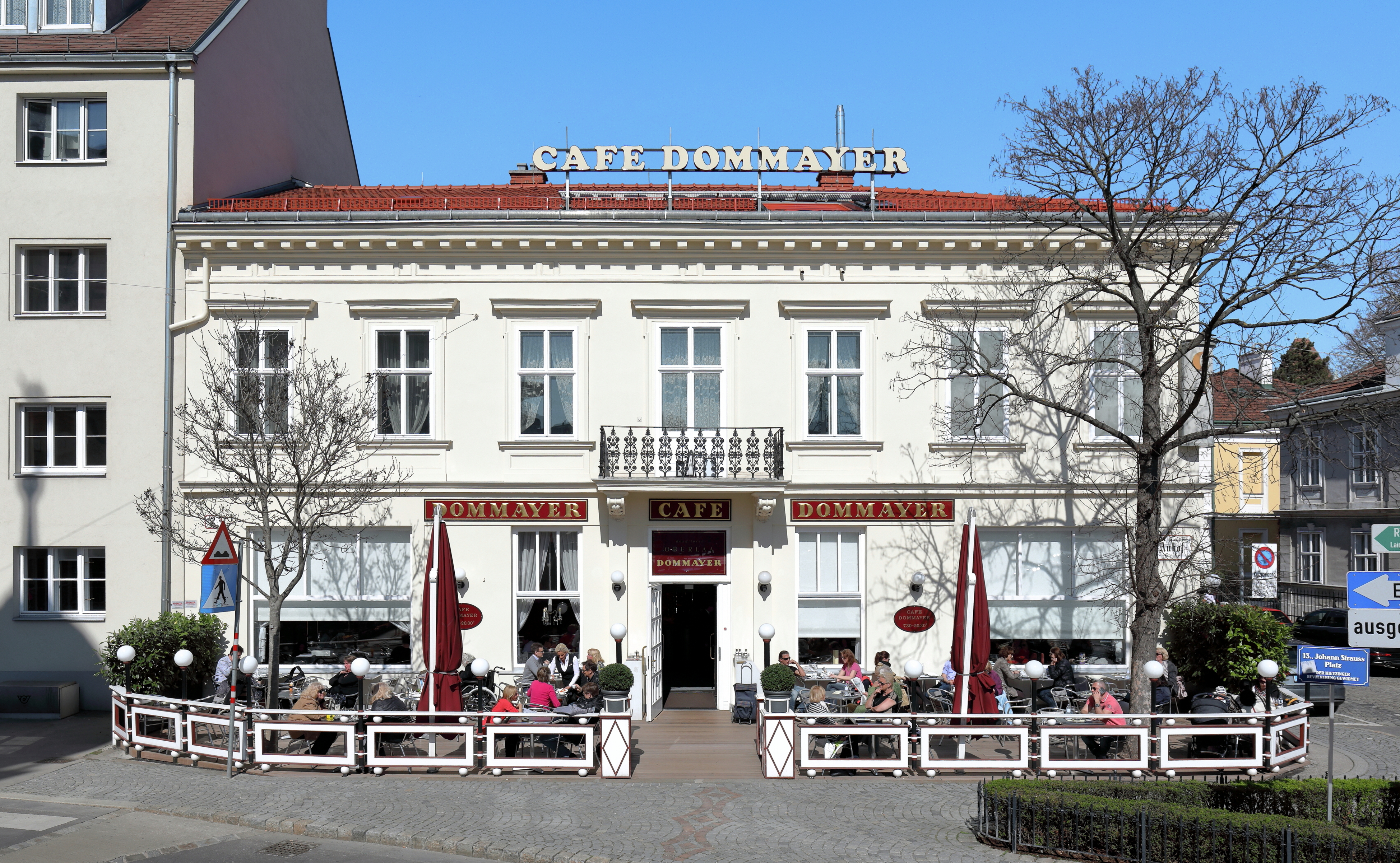 Das Café Dommayer an der Adresse Dommayergasse 1 / Auhofstraße 2 im 13. Wiener Bezirk Hietzing. In dem 1880 aufgestockten und 1924 von Franz Rienesl adaptierten Gebäude eröffnete die Cafétiersfamilie Schneider 1925 den „Dommayerhof“. Seit 1963 wird der Gastronomiebetrieb unter dem Namen „Café-Dommayer“ geführt.